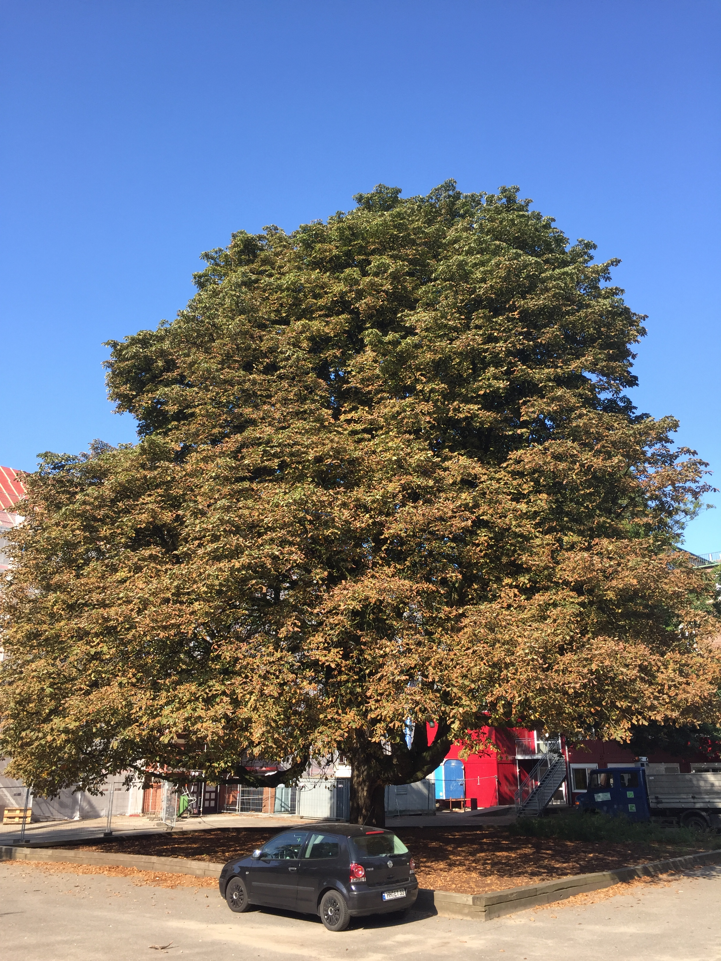 Kastanie auf dem Schulhof des Gymnasiums Lerchenfeld. Einwilligung der Schulleitung zur Fotografie wurde eingeholt.